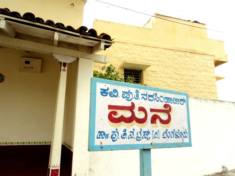 ಕನ್ನಡ: ಪುತಿನ ಮನೆ 1